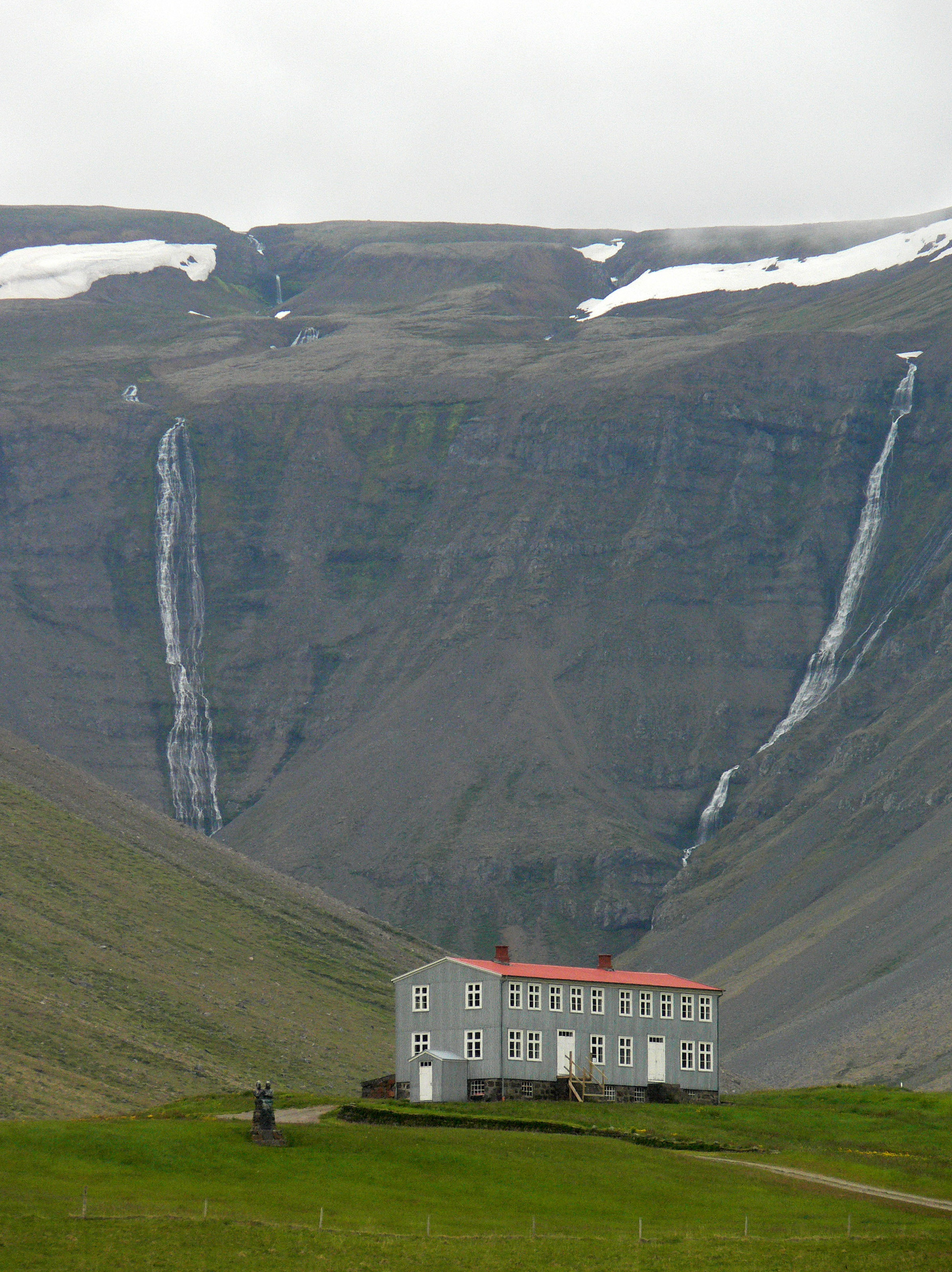 Ólafsdalur, die erste Landwirtschaftsschule Islands aus dem 19. Jh. Jetzt Museum.